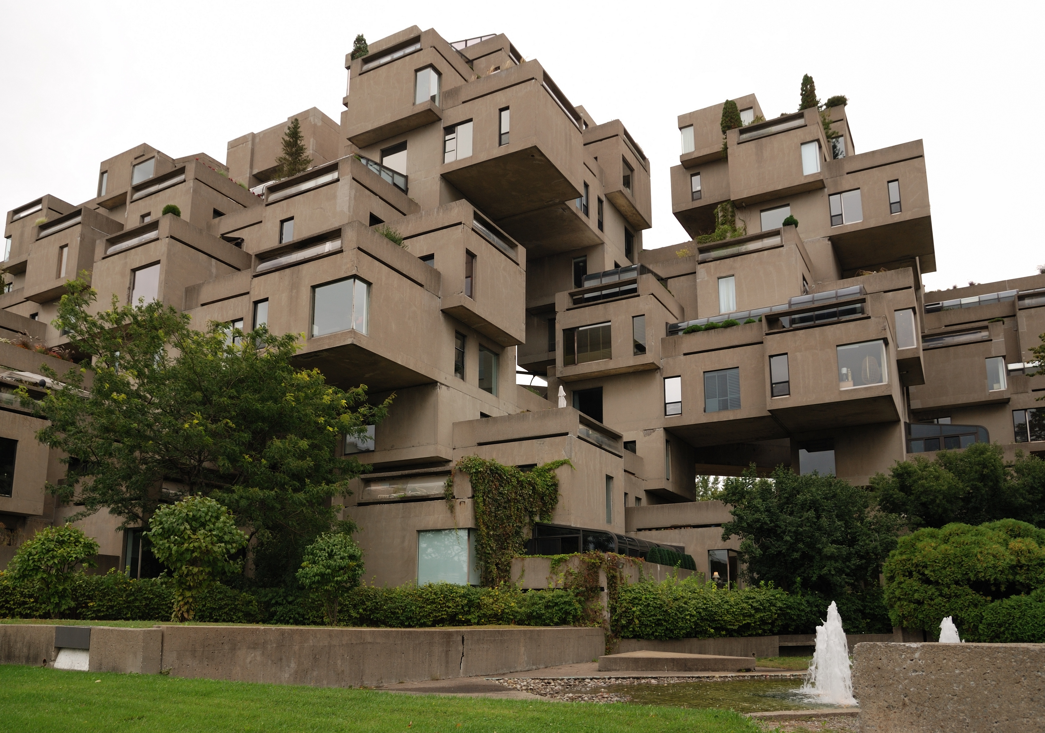 Montreal: Habitat67